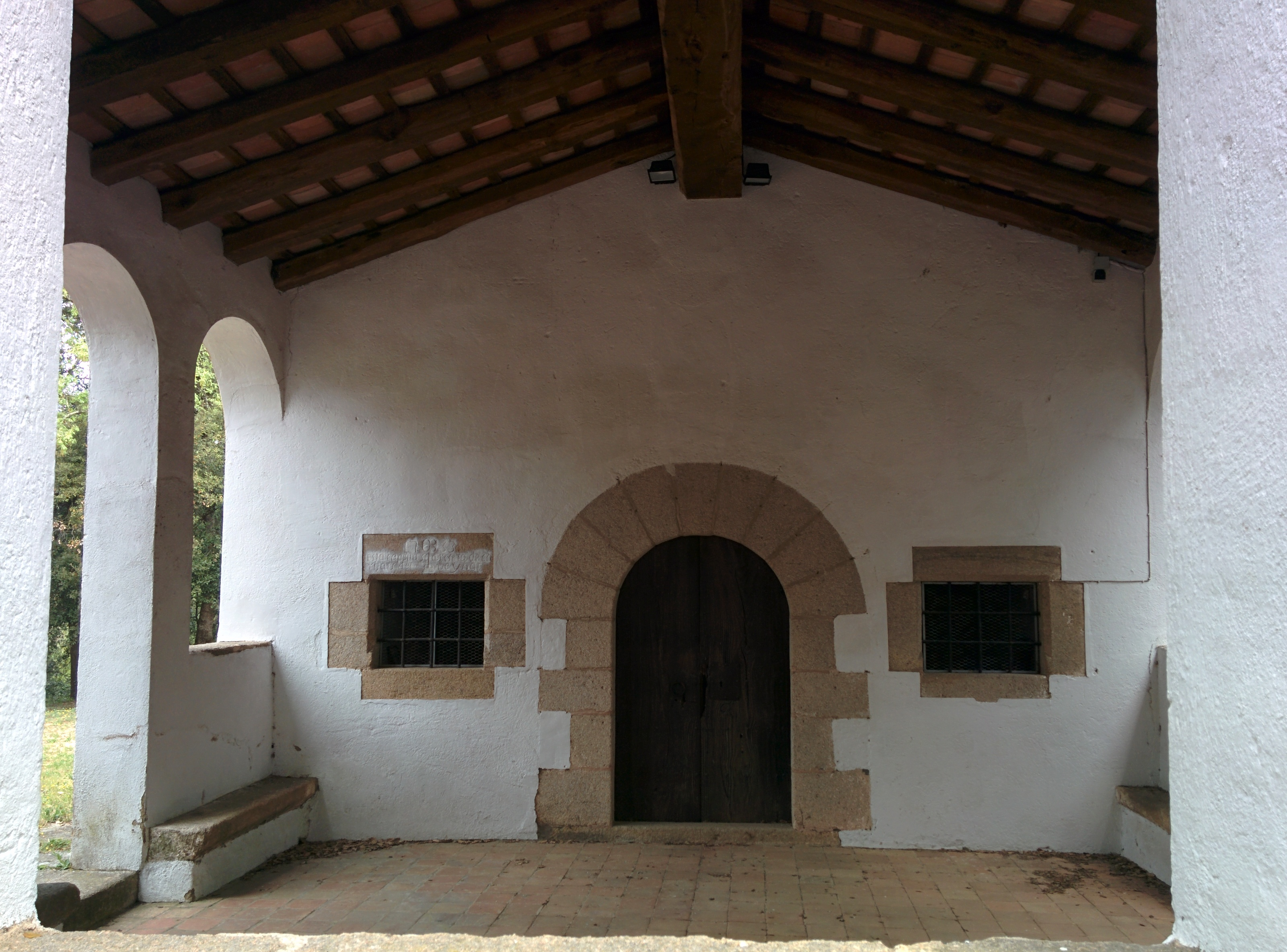 Ermita de Sant Marçal (Santa Coloma de Farners)